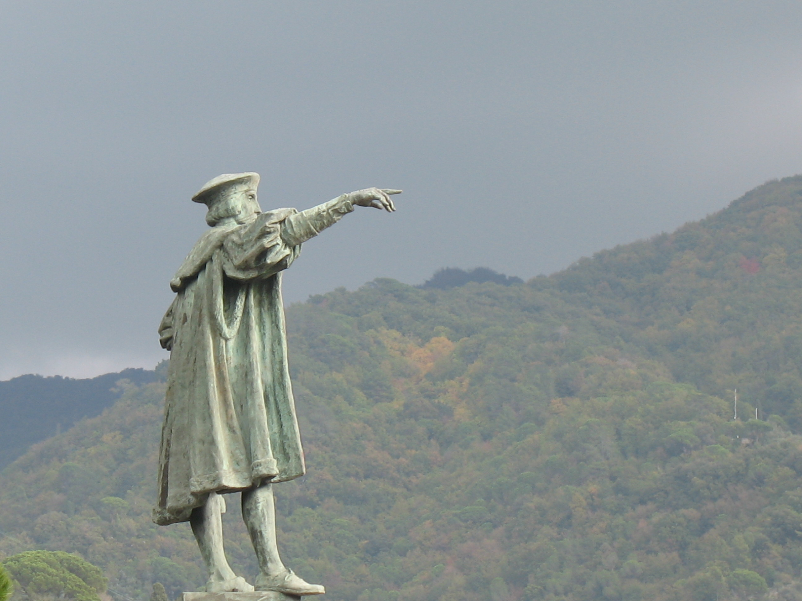 Serie di Immagini da Rapallo e San Michele di Pagana (Rapallo), in provincia di Genova